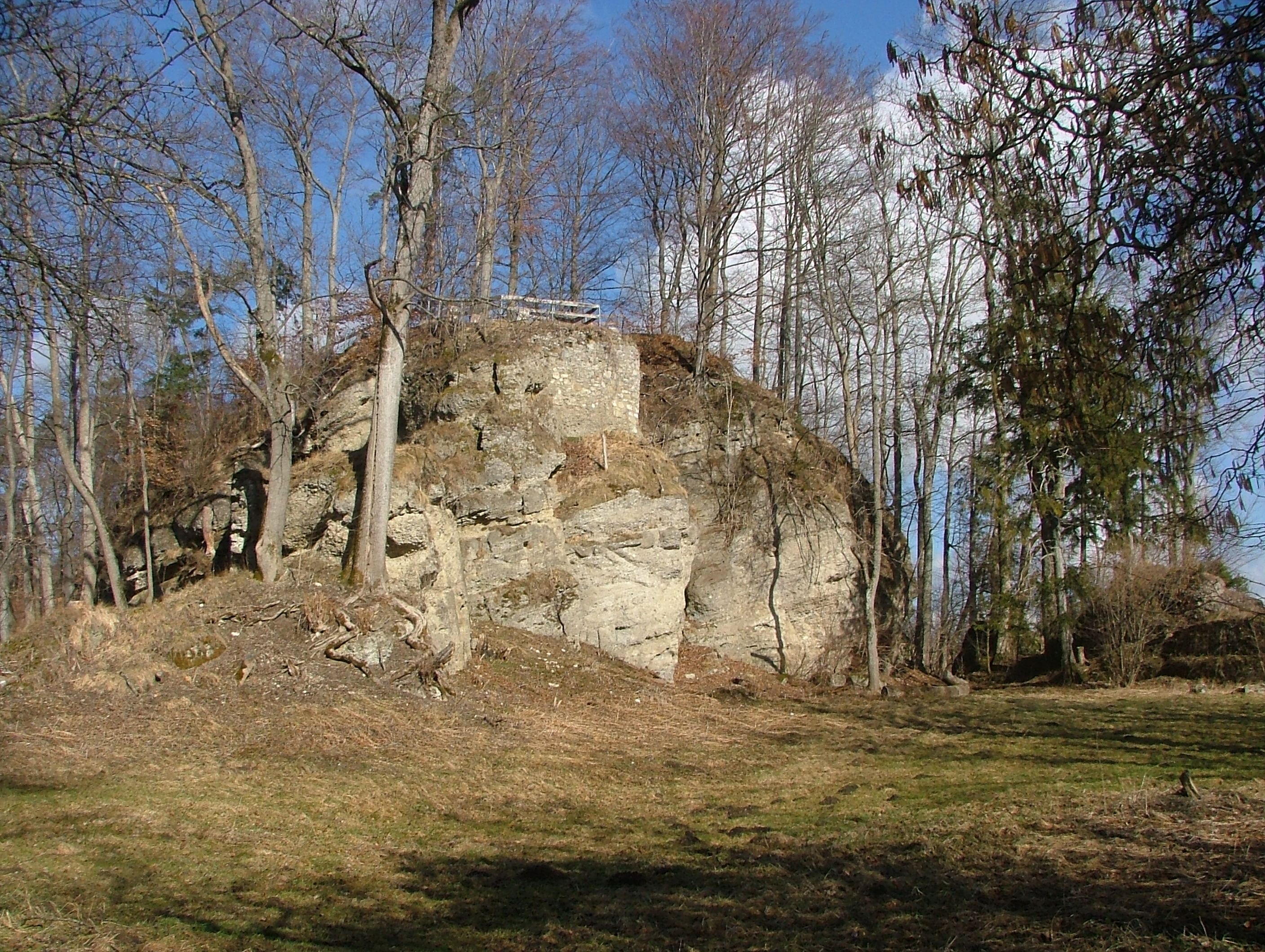 Wagegg